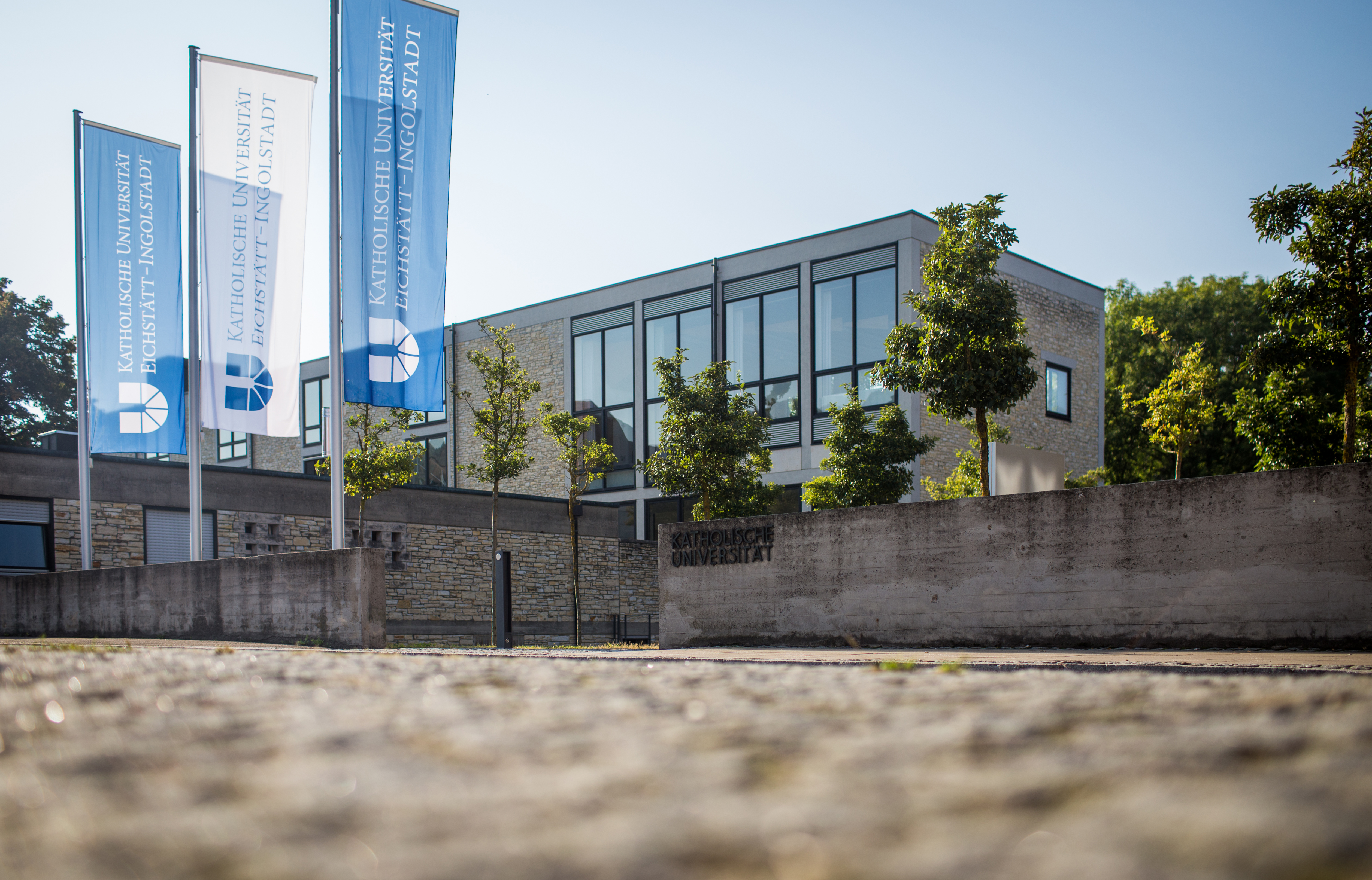 Hauptgebäude der KU Eichstätt-Ingolstadt in der Ostenstraße